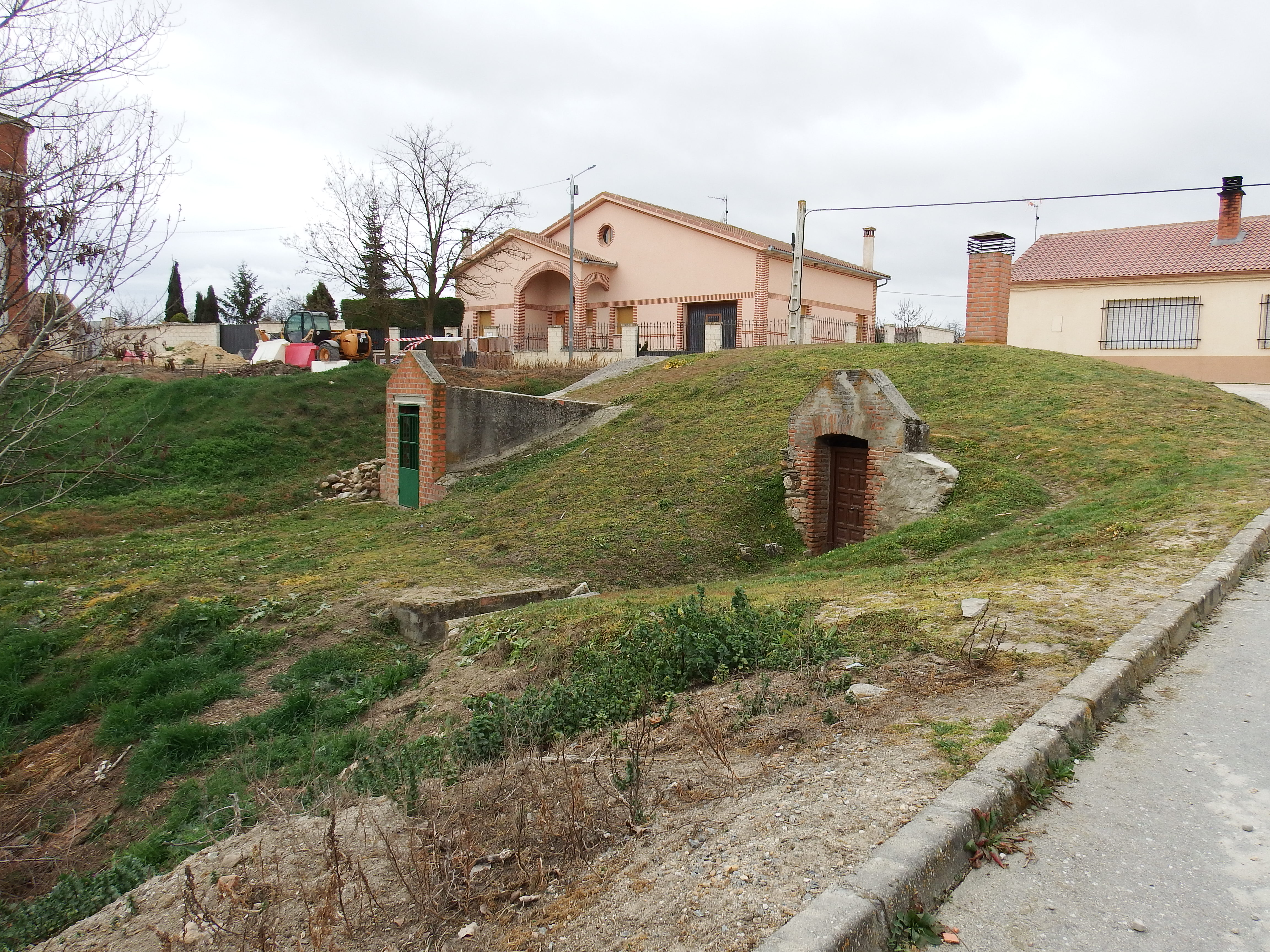 Aldehuela del Codonal